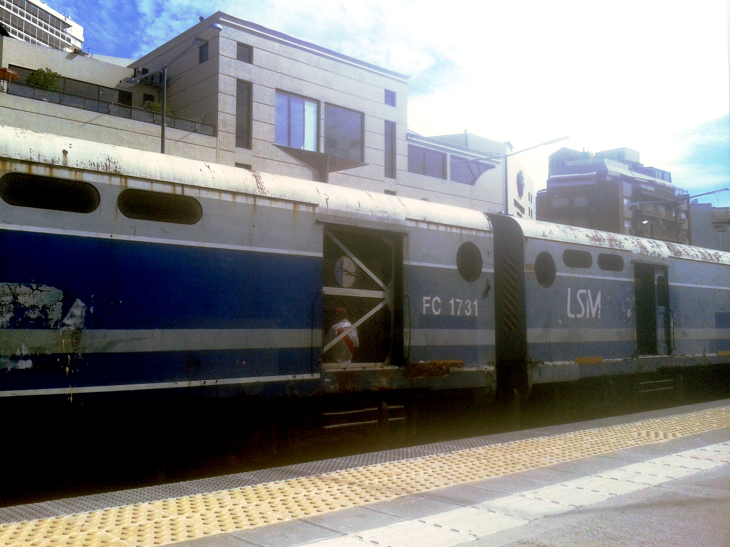 Línea San Martín